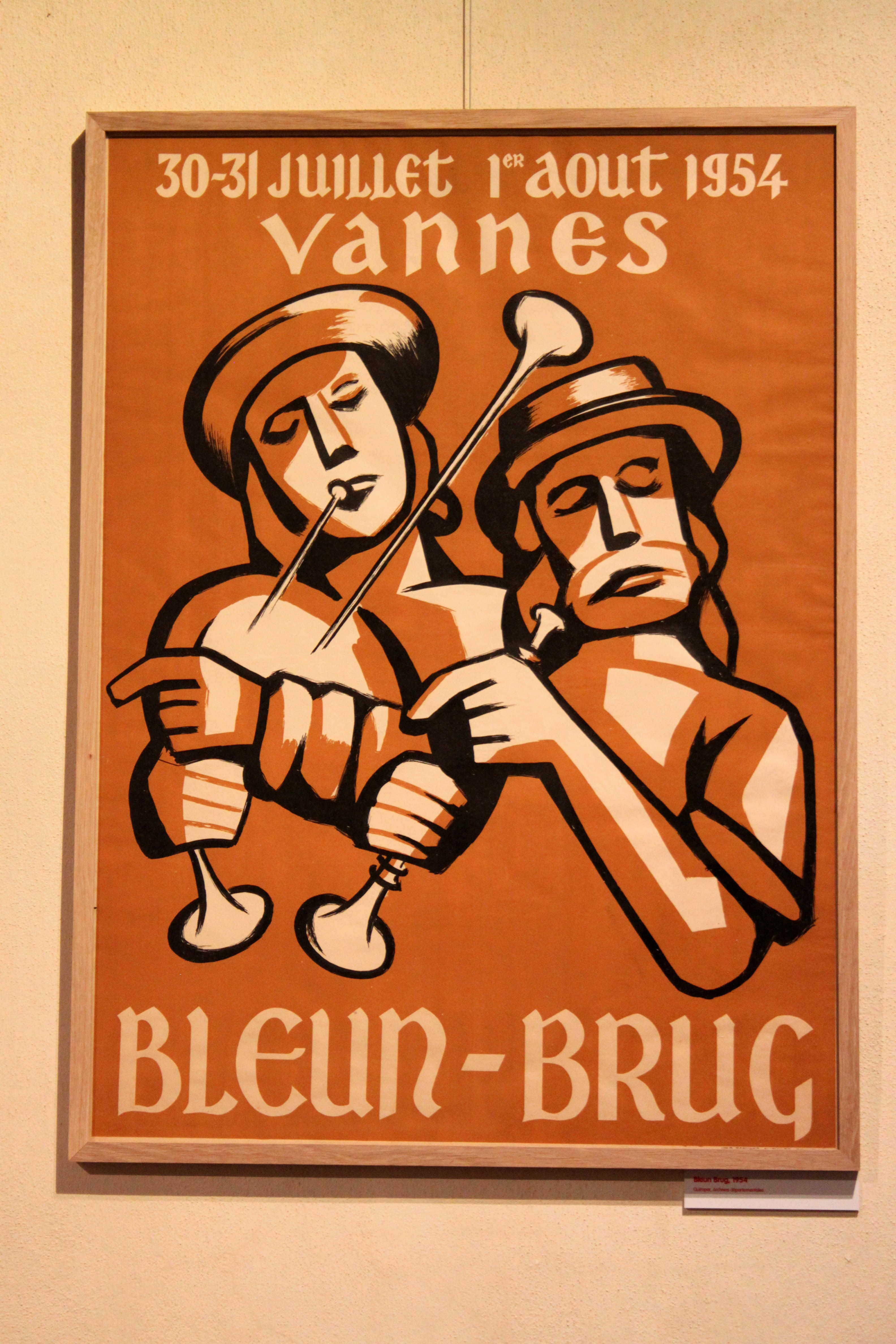 Fest-noz Bleun-Brug de 1954 à Vannes, affiche exposée au Château de Kerjean (Château de Kerjean), conservée par les archives départementales, Quimper.